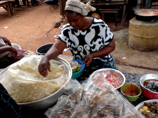 Vendeuse d'attieké This is an image of food from Ivory Coast